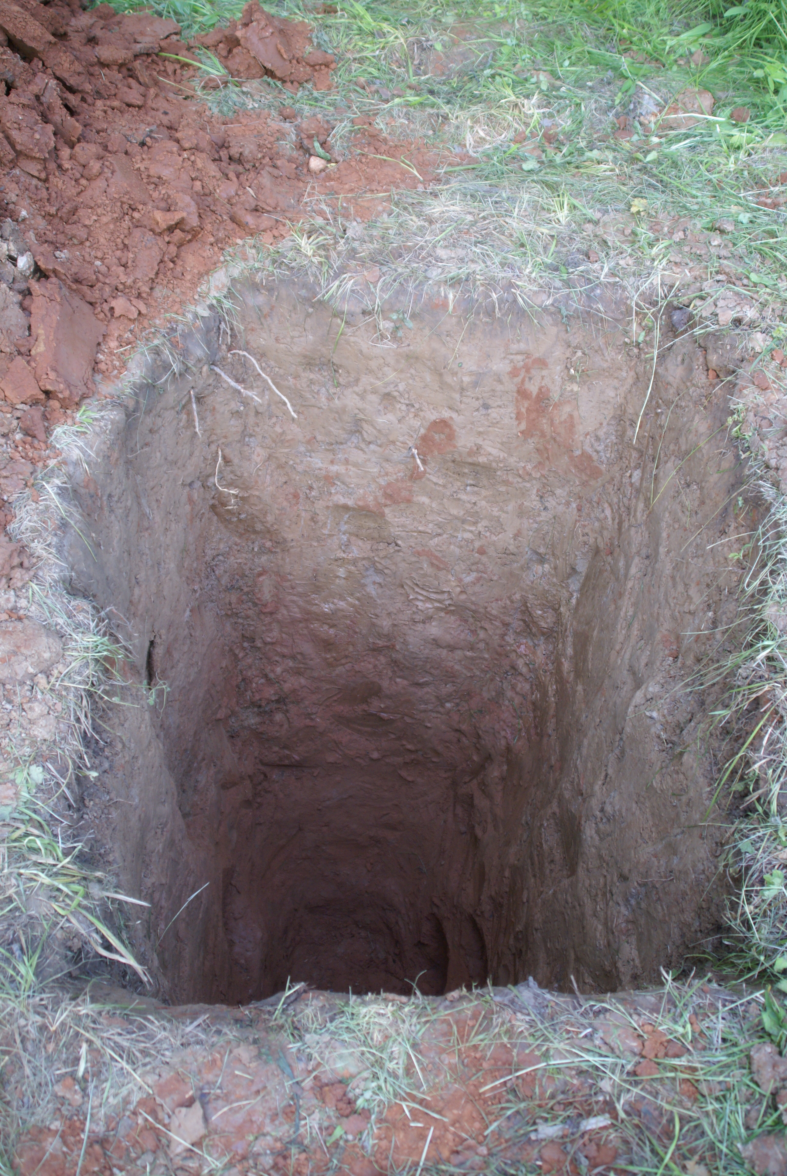 Шурф, проходка до 2,5 м, четвертичные покровные суглинки и московская морена